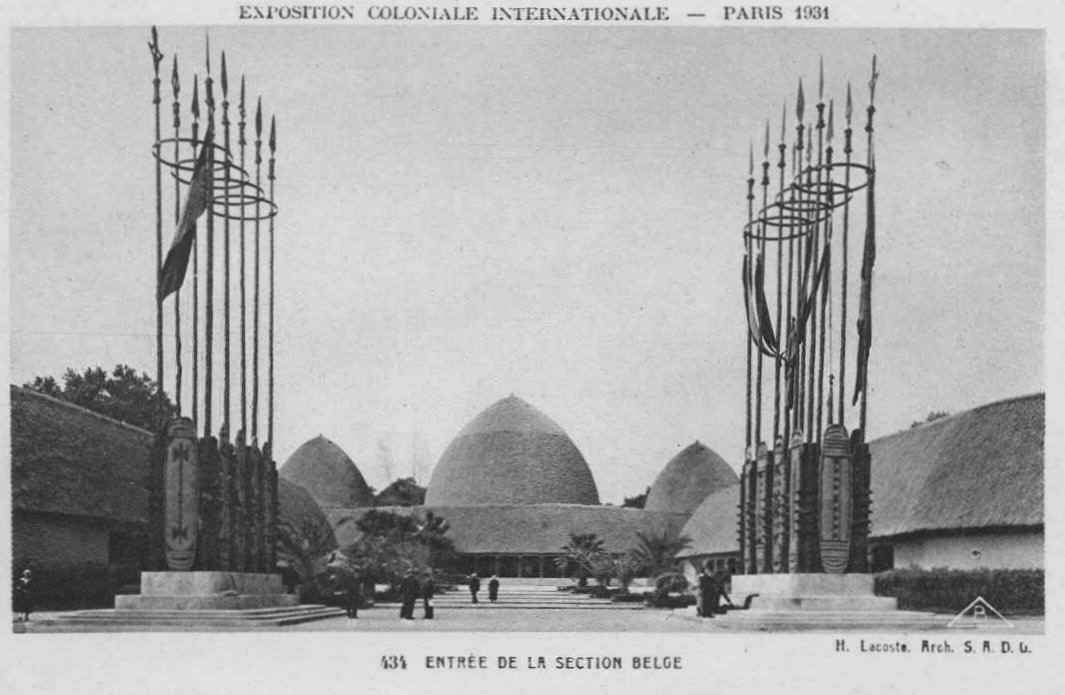 Pavillon de la Belgique à l'Exposition Coloniale de PARIS en 1931